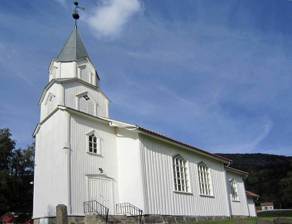 Gjøvdal kirke (Åmli kommune, Aust-Agder)